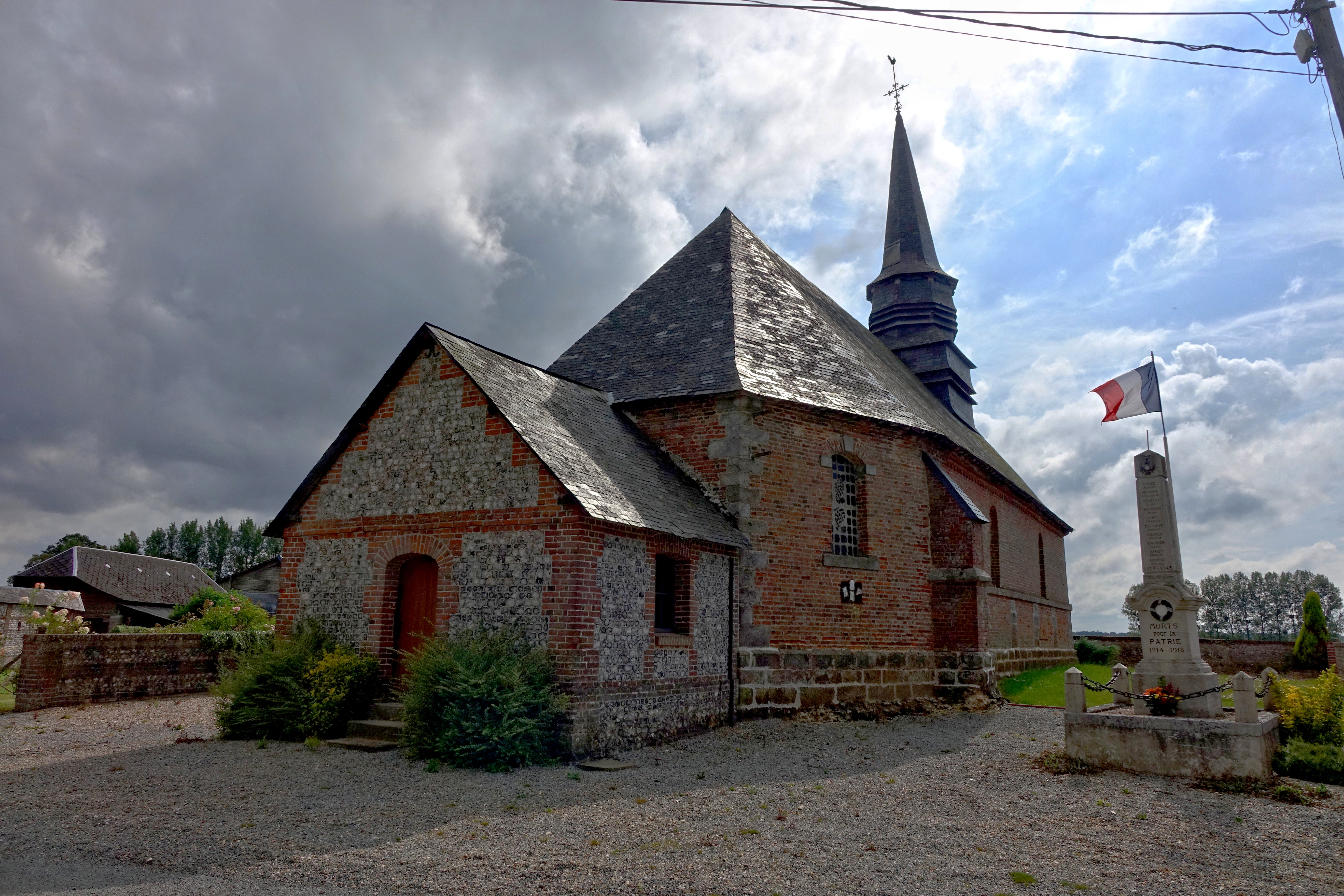 Église d'Ardouval, Seine-Maritime, France